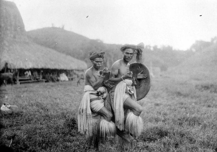 Repronegatief. Twee mannen dansen de Zaiwo met zwaard en schild, Soemba